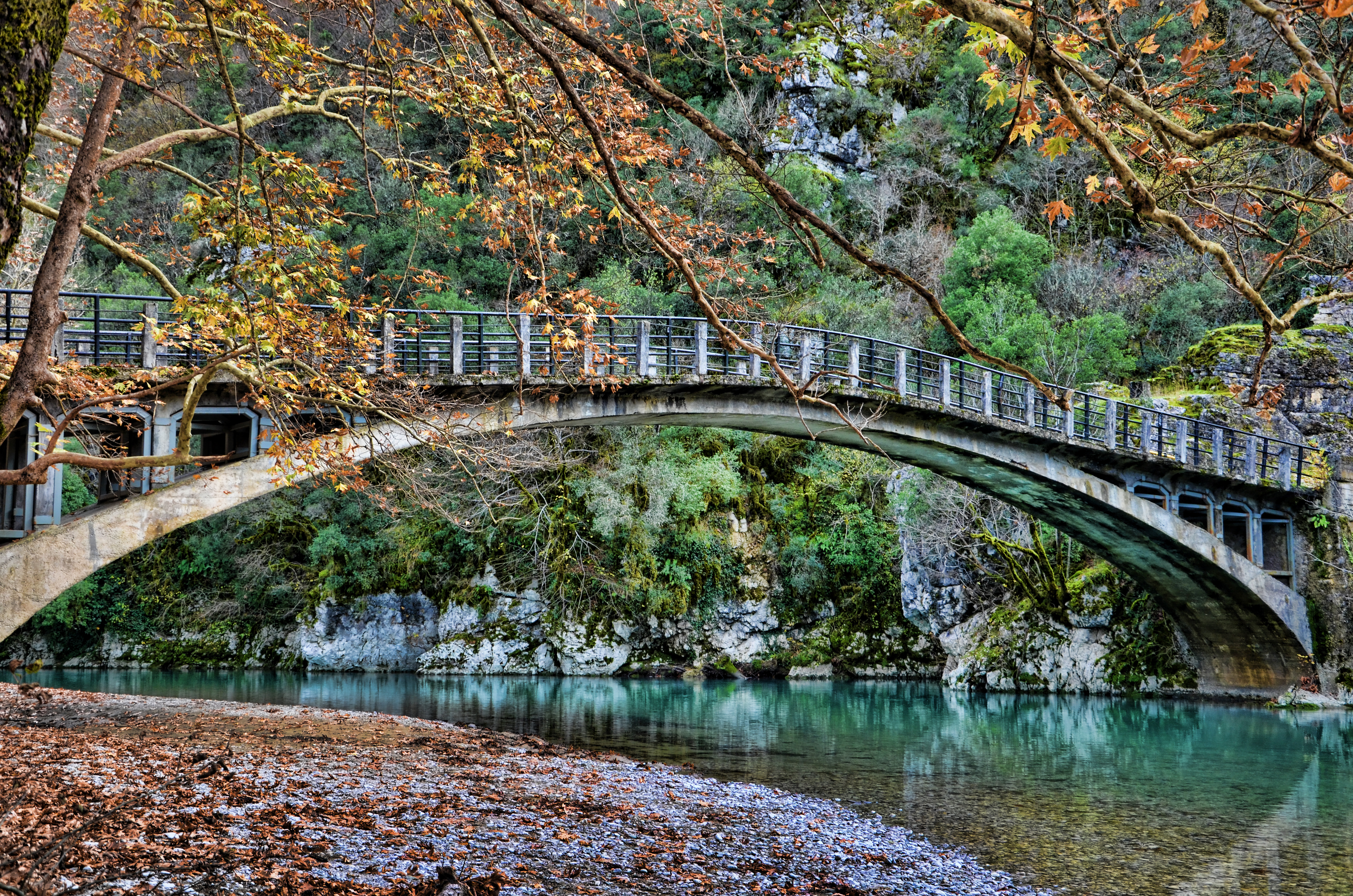 Ο Βοϊδομάτης (ποτάμι του Βίκου) είναι ποταμός του νομού Ιωαννίνων, παραπόταμος του Αώου. Οι κύριες πηγές του βρίσκονται κάτω από το χωριό Βίκος. Στην διαδρομή του δέχεται και άλλα υδάτινα ρεύματα που σχηματίζονται στις πλαγιές της Τύμφης ή προέρχονται από το Φαράγγι του Βίκου και τελικά συμβάλει στον Αώο κοντά στην Κόνιτσα. Ο ποταμός έχει συνολικό μήκος 15 χιλιόμετρα. Η ονομασία του Βοϊδομάτη προέρχεται από το σλάβικο Μπόντε - Ματ, που σημαίνει καλό νερό. This is a photography of Natura 2000 protected area with ID GR2130001